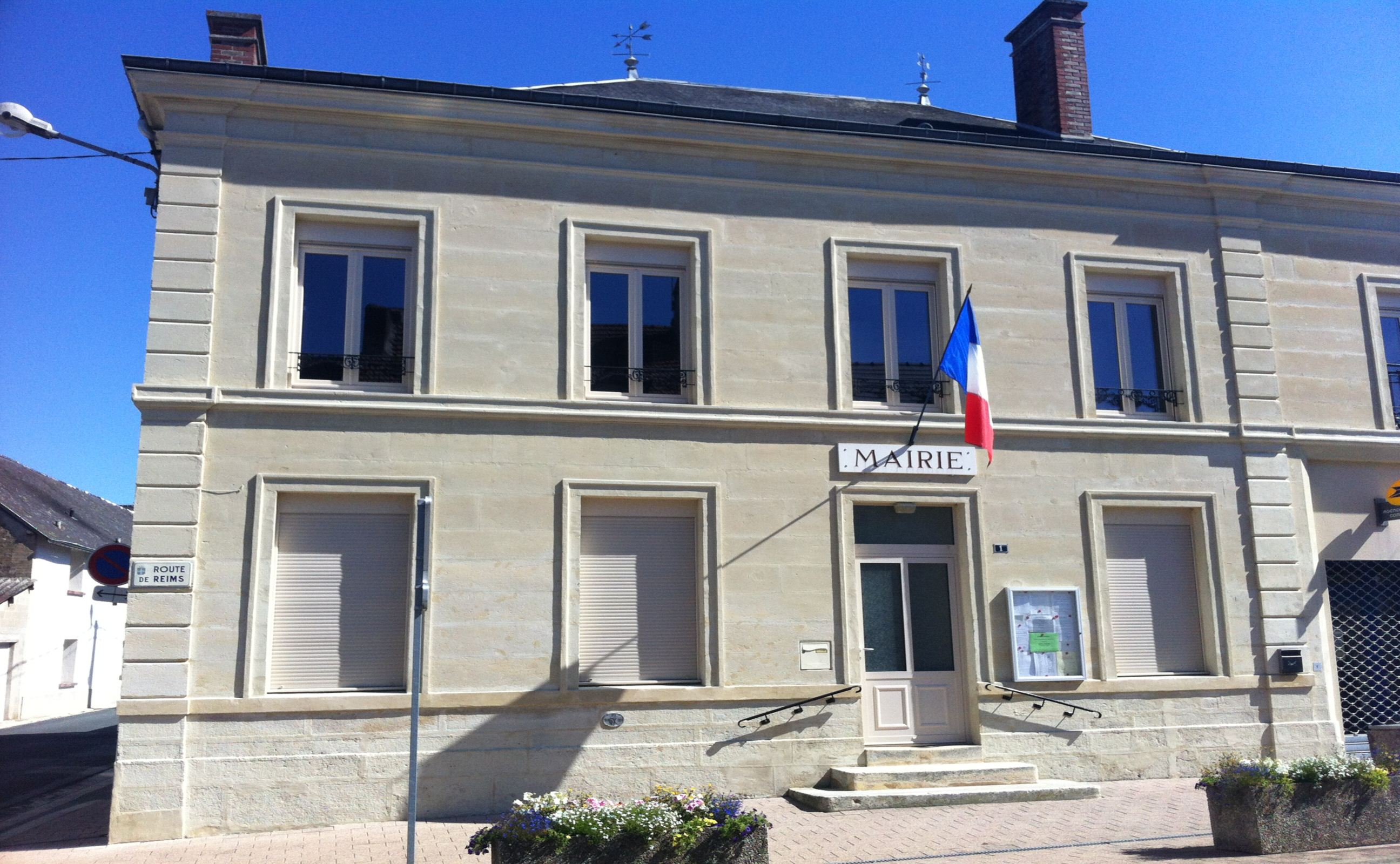 Mairie Isles sur Suippe